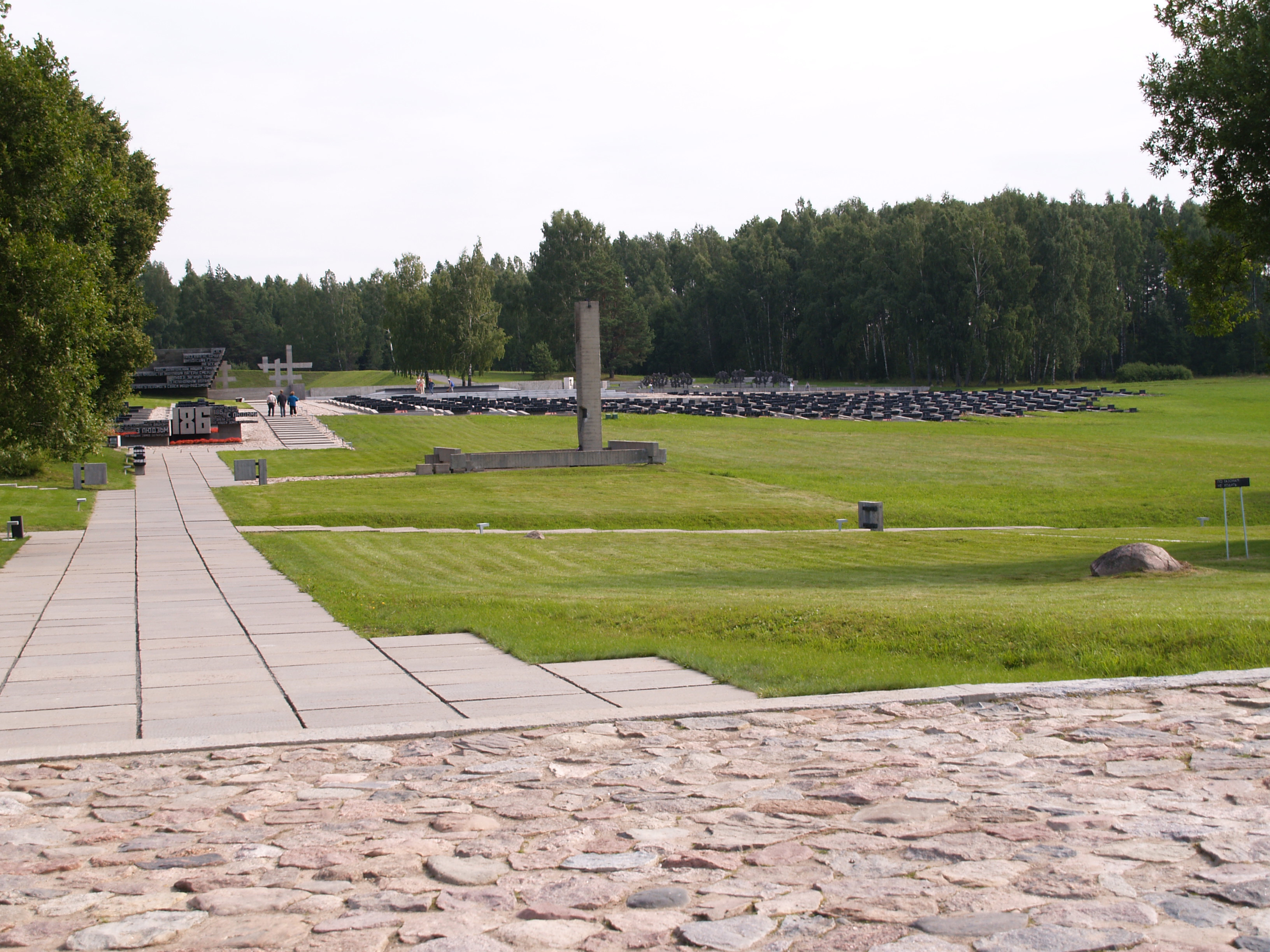 Belarus, Khatyn